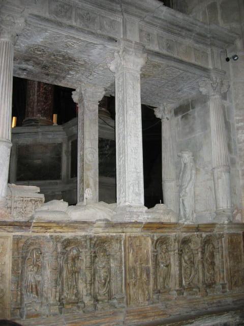 Grab des Kardinal Briconnet (Narbonne)